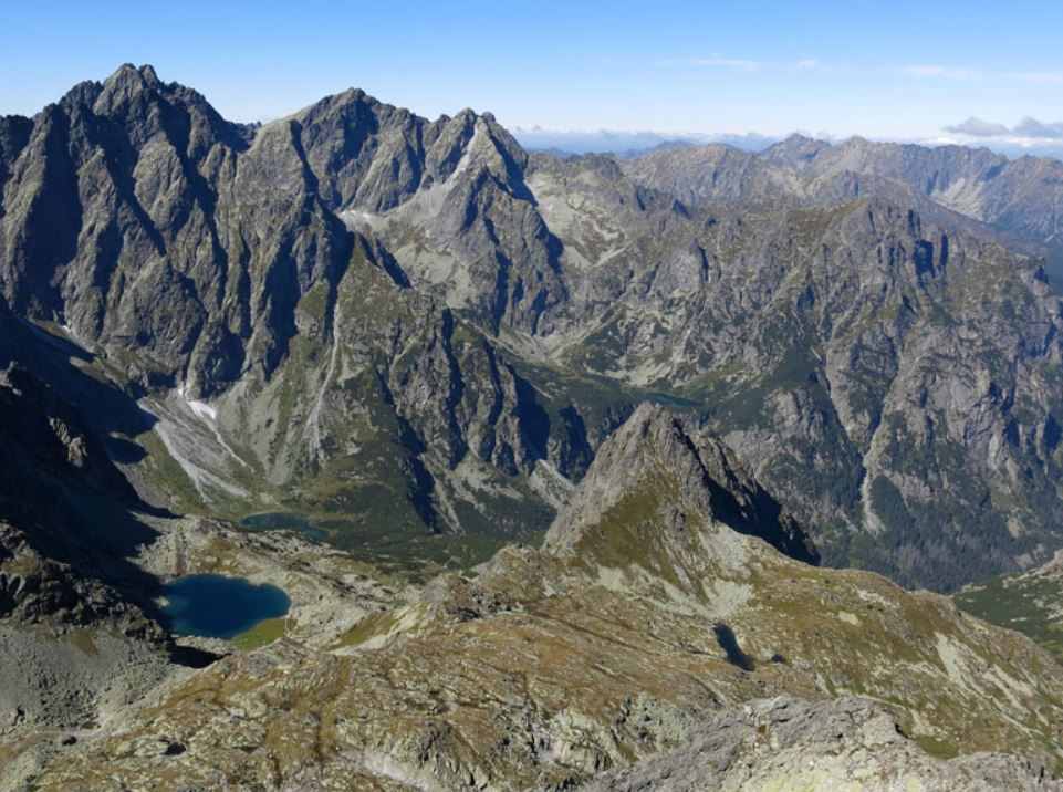 Hrubé pleso v Bielovodskej doline, vpravo pod Hrubou vežou